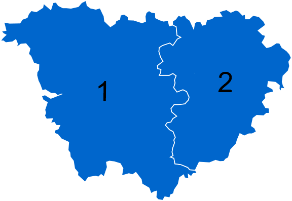 Résultats des élections législatives de la Haute-Loire en 2012